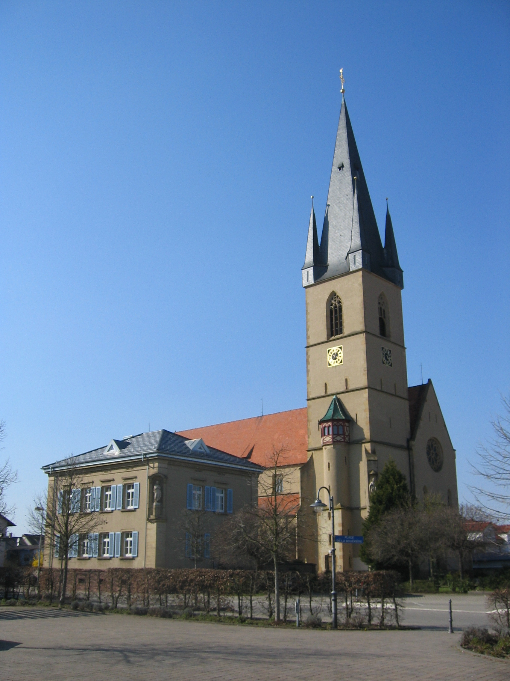 Kath. Kirche Hambrücken Deutschland